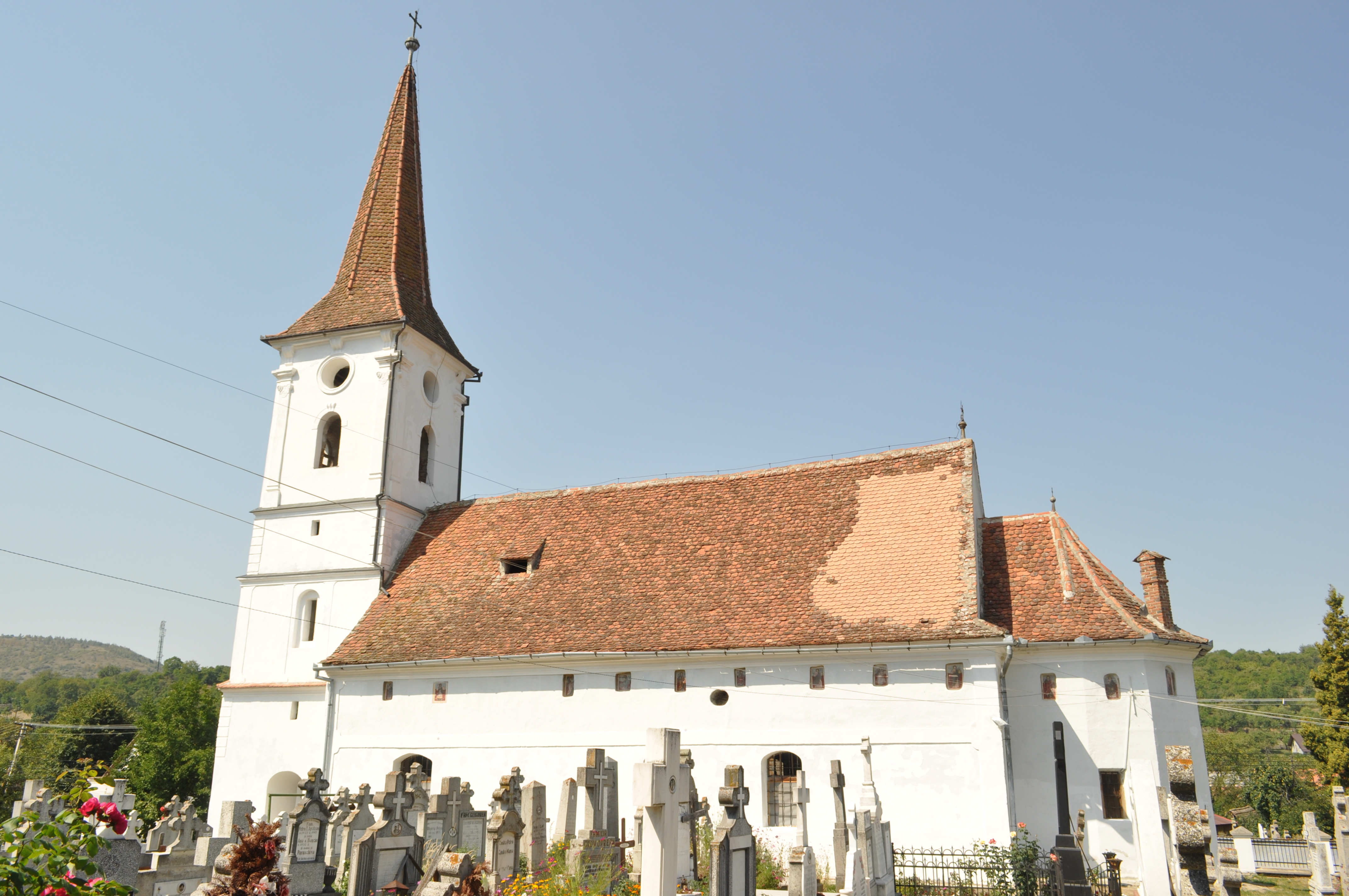 Biserica ortodoxă „Sfânta Treime”